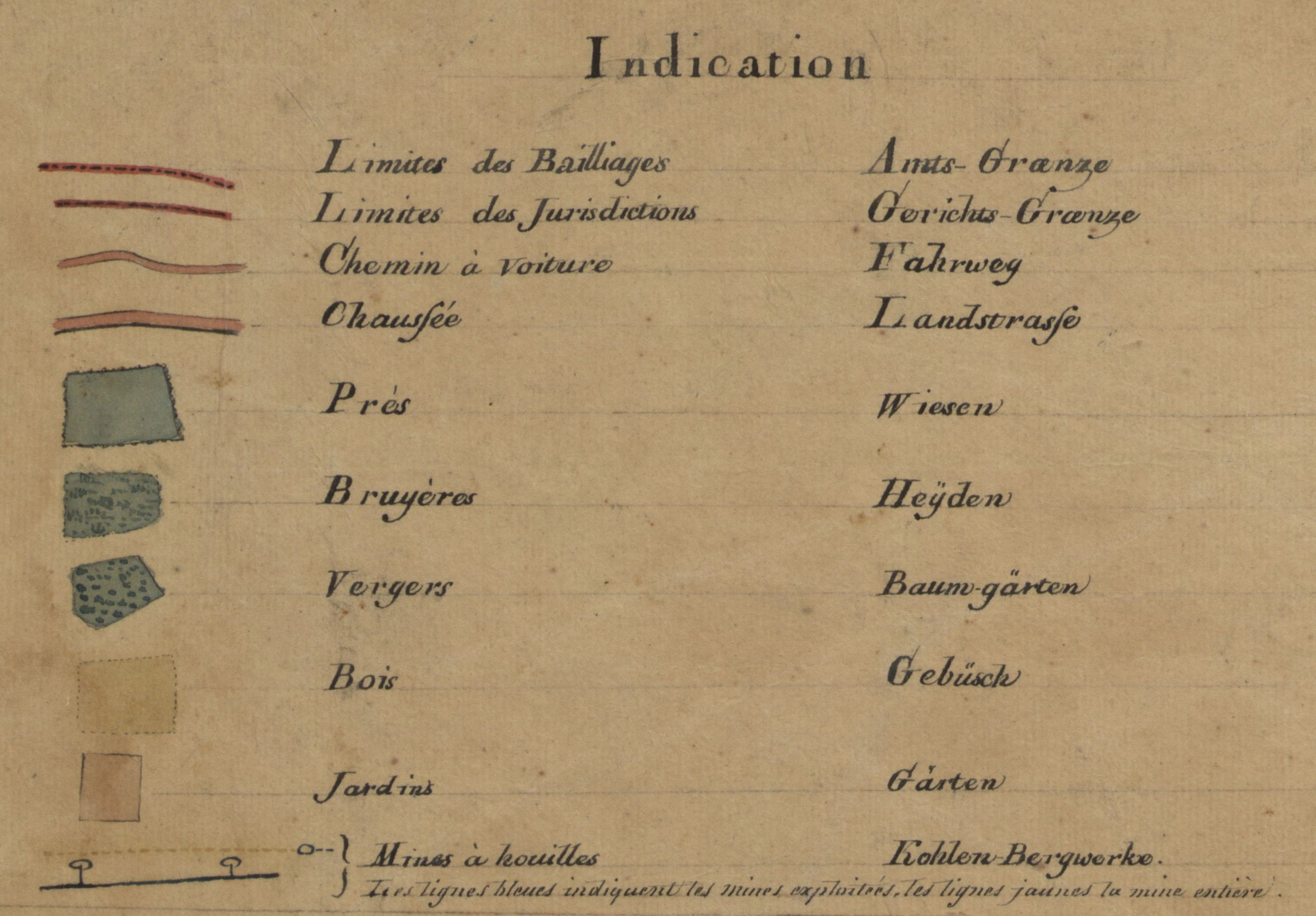 Niemeyersche Karte. Nachdruck als „Carte speciale des mines“. Legende aus: Spezialkarte des östlichen Teils des Bergwerkdistrikts des Amts Bochum, Blatt I